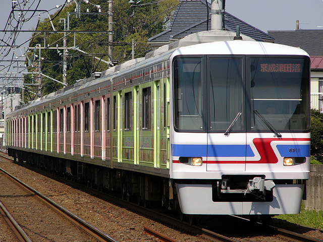 新京成電鉄8900形「イオンショッピングセンター」ラッピング広告車両 みのり台駅にて撮影